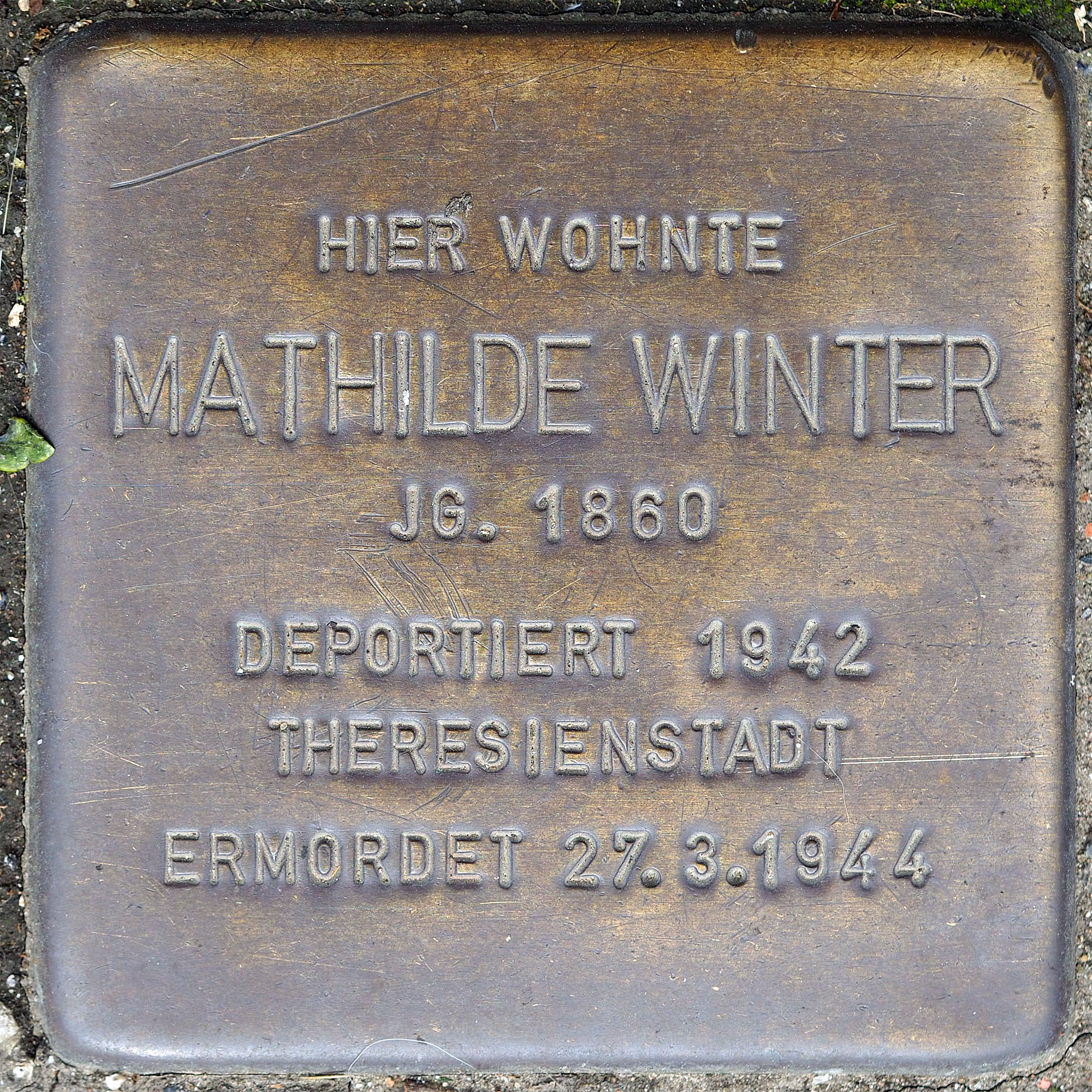 Stolpersteine Korschenbroich: Winter, Mathilde